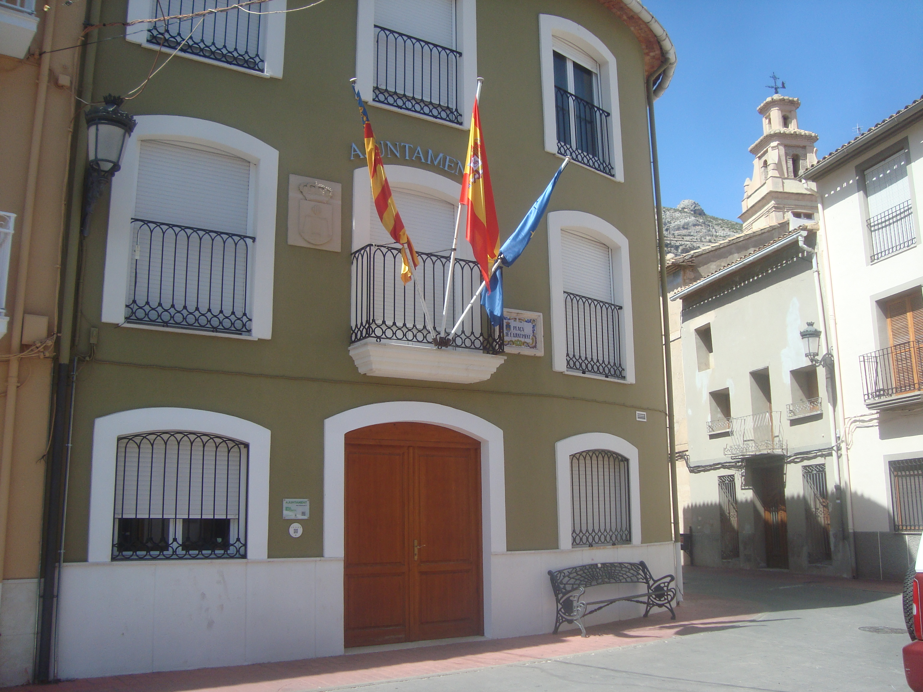 Ayuntamiento de Benigembla (Alicante)